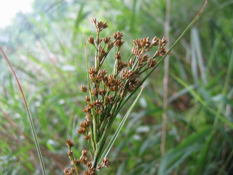 Binsenschneide Cladium mariscus, Müritz-Gebiet